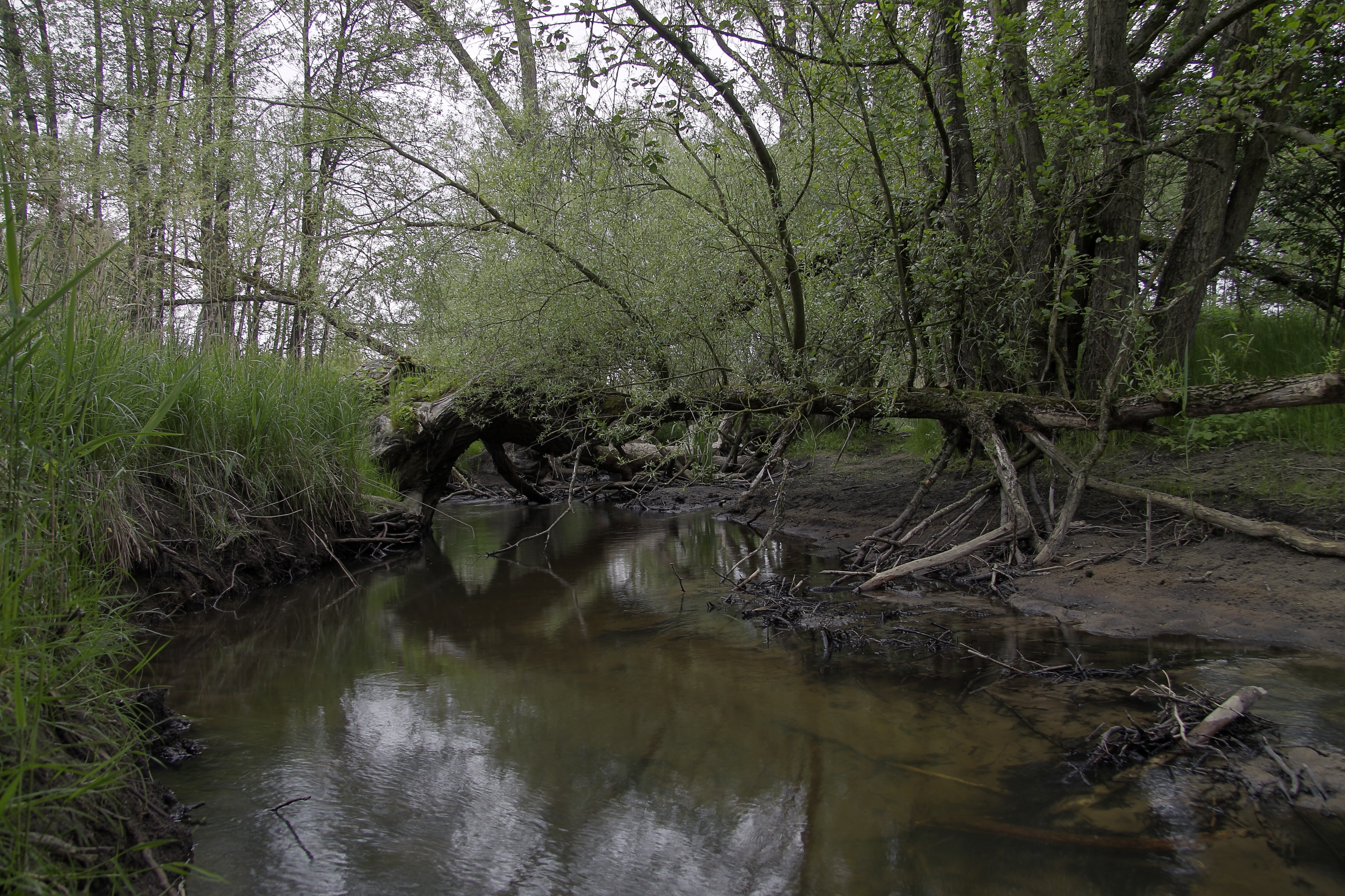 Schwinge mit Prallhang (links) und Gleithang (rechts) im Naturschutzgebiet Schwingetal und Peenewiesen bei Trantow , Vorpommern-Greifswald